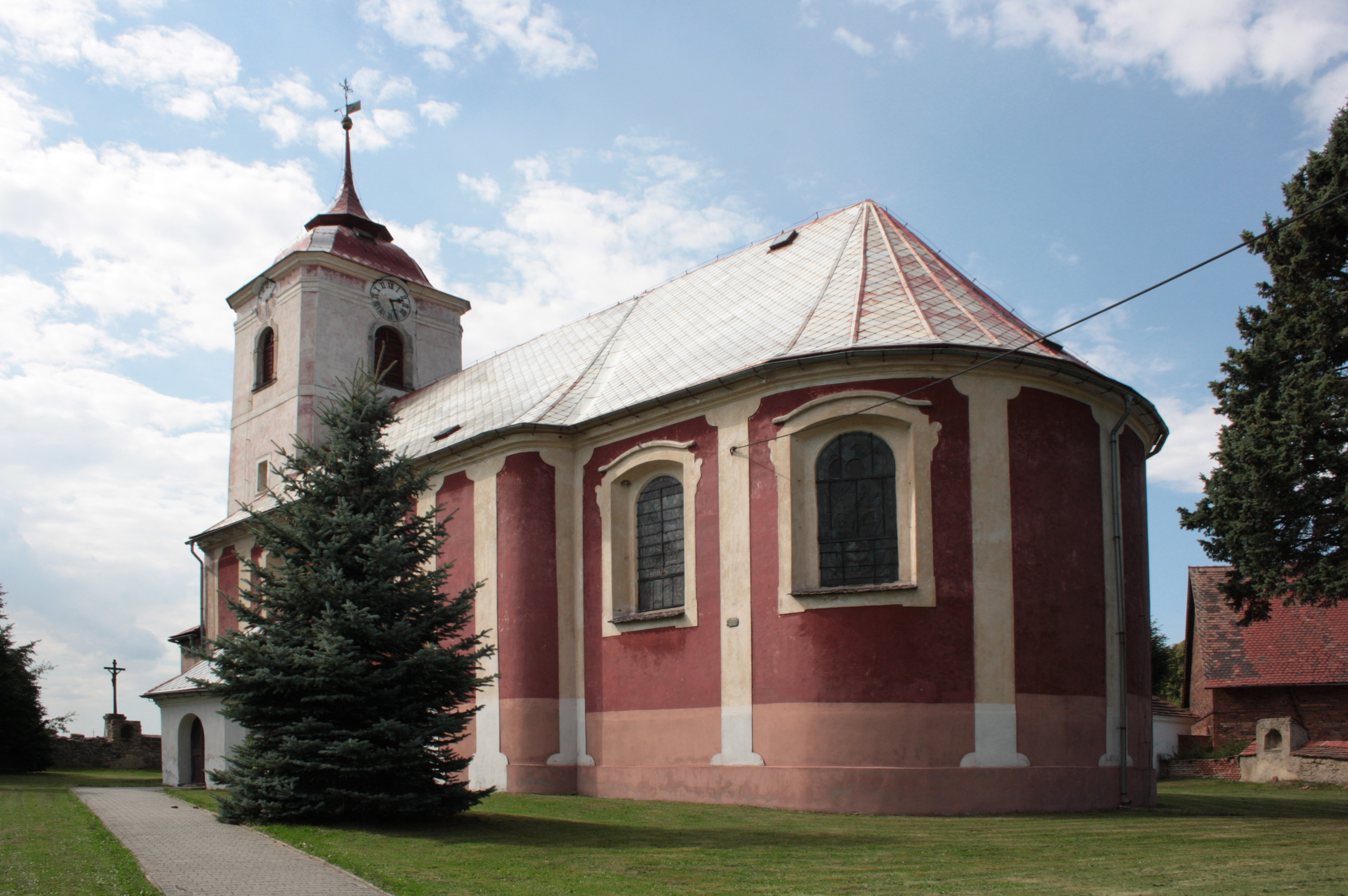 This photograph was taken with a DSLR from WMCZ's Camera grant. Kostel svatého Archanděla Michaela v Bulovce v Libereckém kraji.